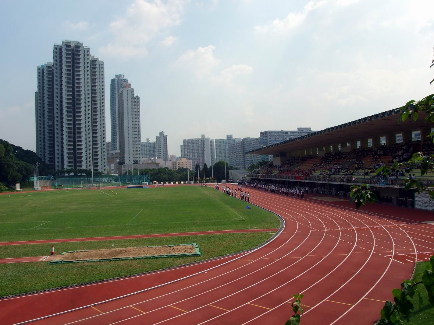 斧山道運動場